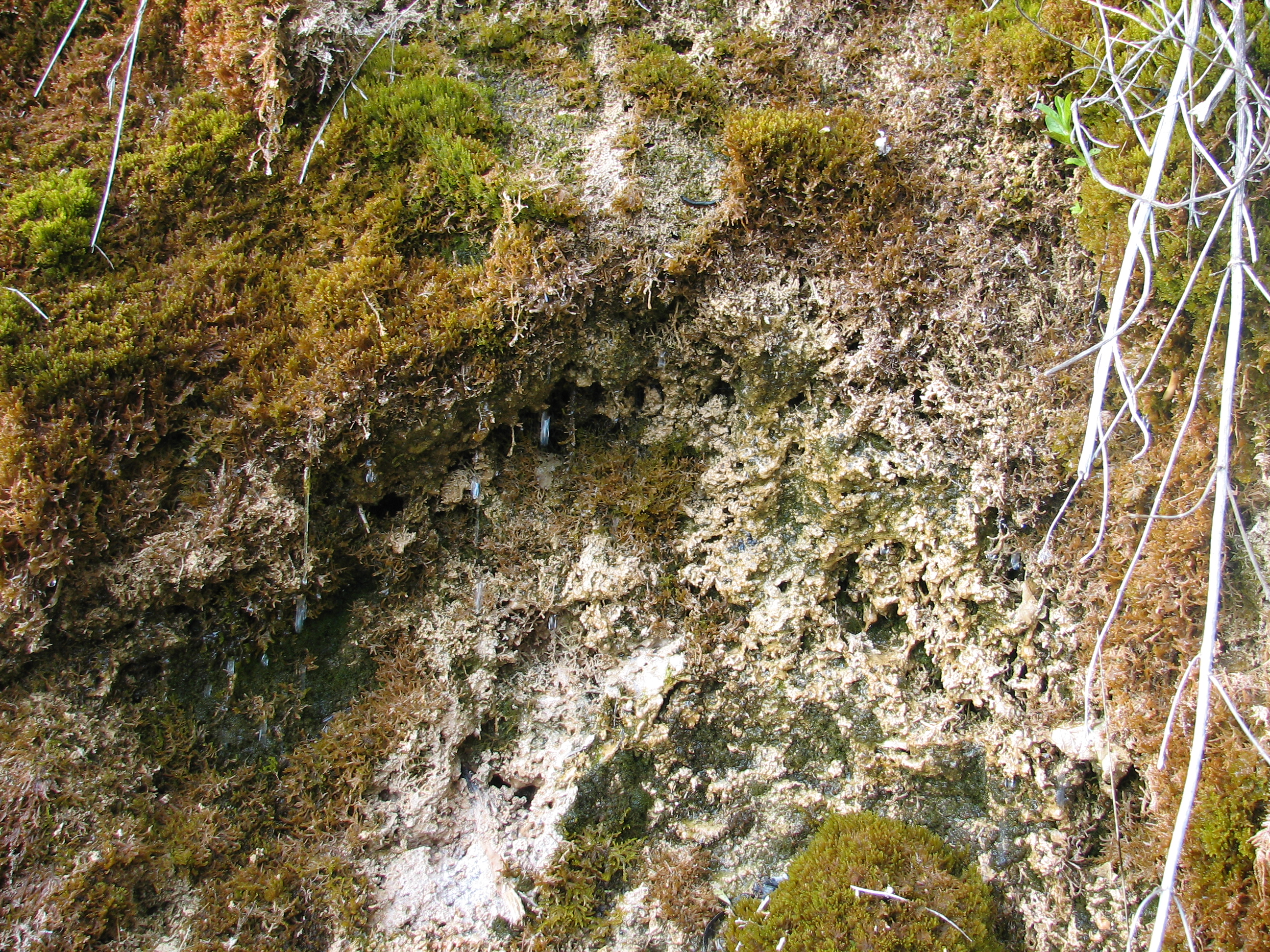 Kalktuff "Eselstrog" am Fuß der Ludolfklinge bei Mosbach-Diedesheim an der Bundesstraße 37 (Straße "Im Knoden") Rchtung Binau